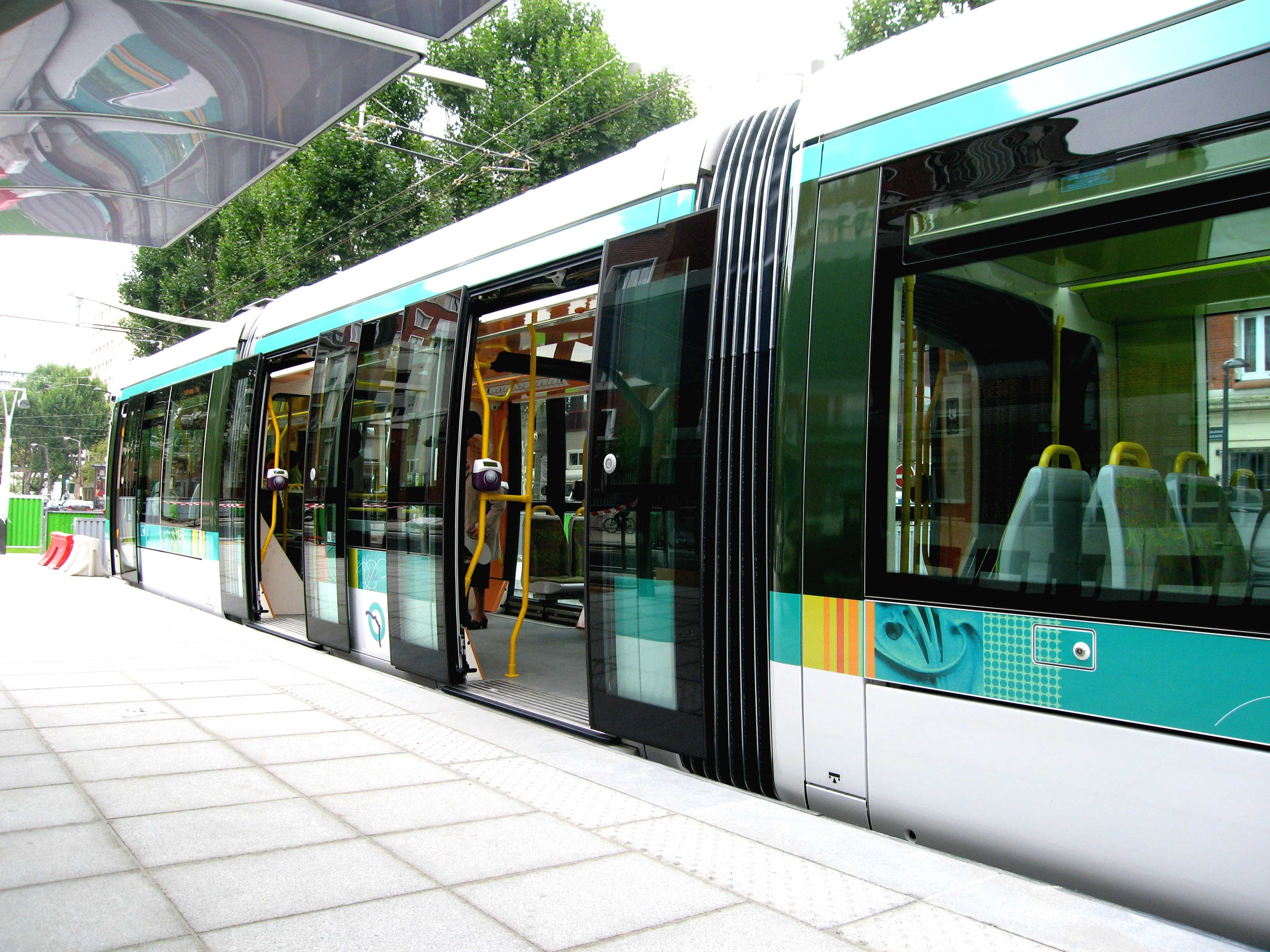 Ligne tramway T3 Rame Citadis 402 Vue lattérale portes ouvertes Porte d'Ivry, Journées du Patrimoine en présentation statique. Paris, France.